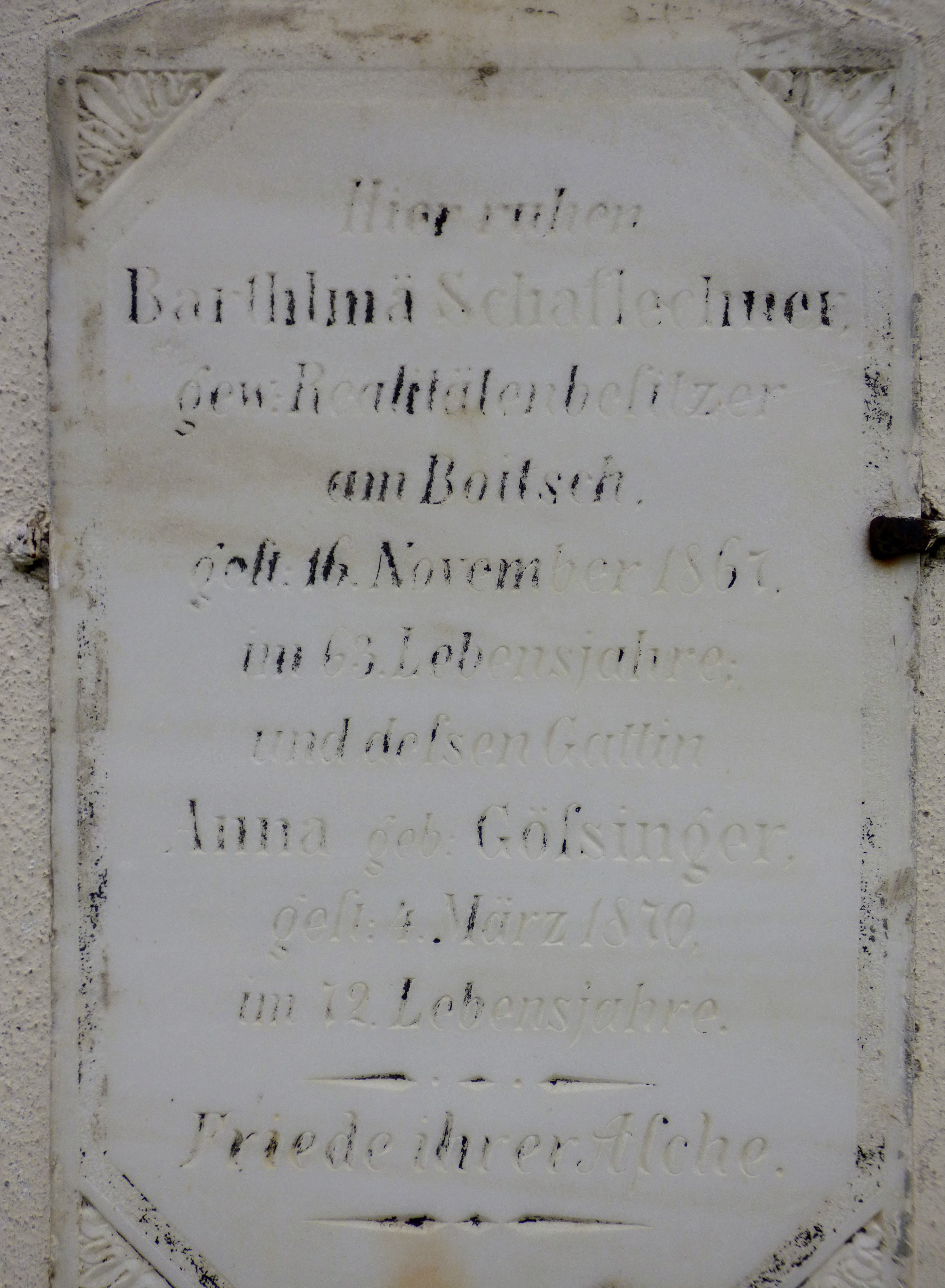 Grabstein am Friedhof Glantschach (Gemeinde Liebenfels, Kärnten), darauf Ortsbezeichnung "Boitsch" (= Woitsch)